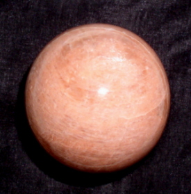 Eine Oligoklas Kugel im Maßstab 1:1 photographiert